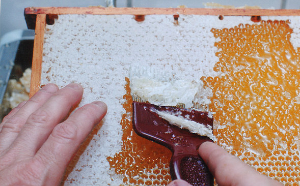 Honigschleuder